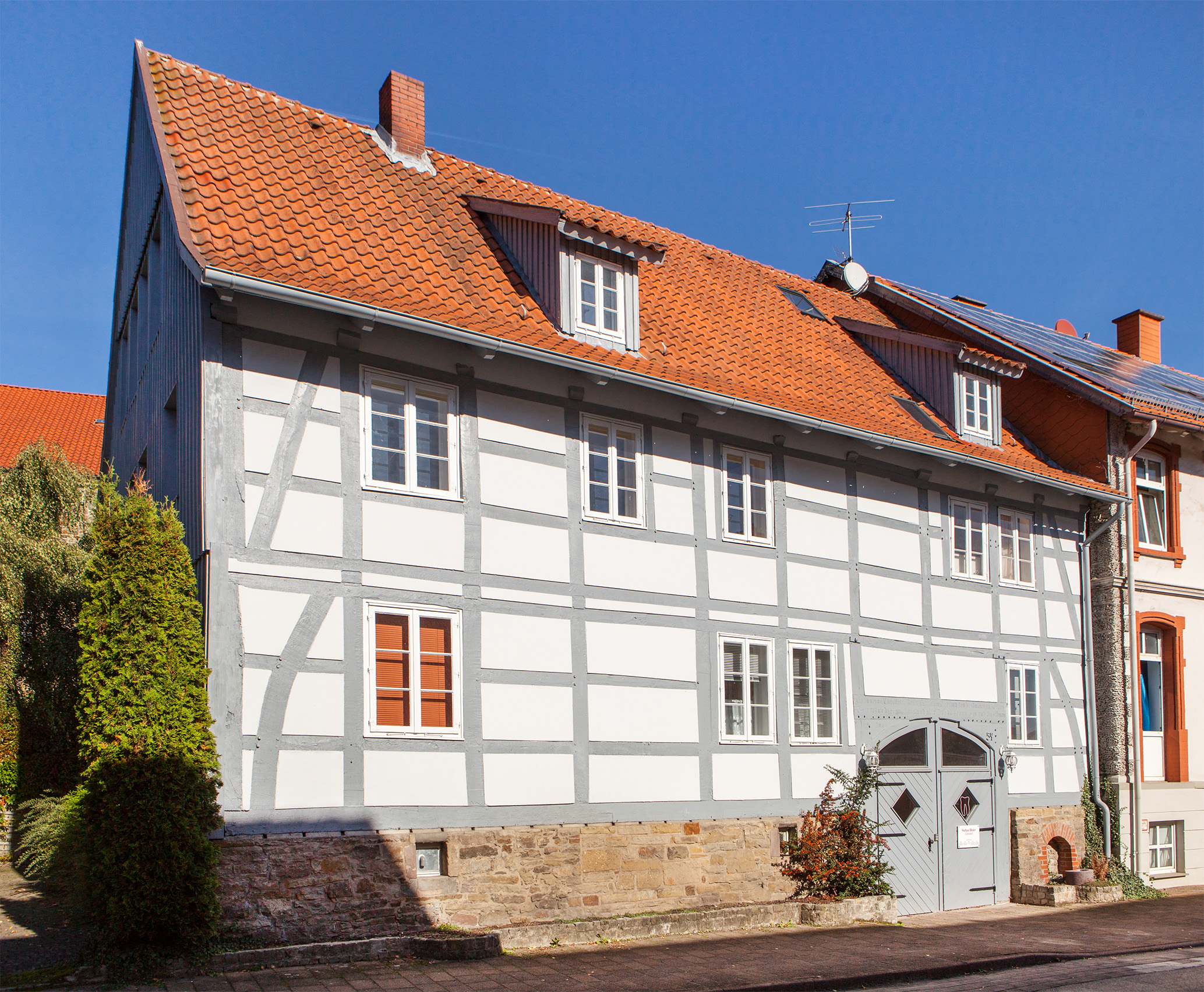 Almena (Extertal), Hauptstr. 54This is a photograph of an architectural monument.